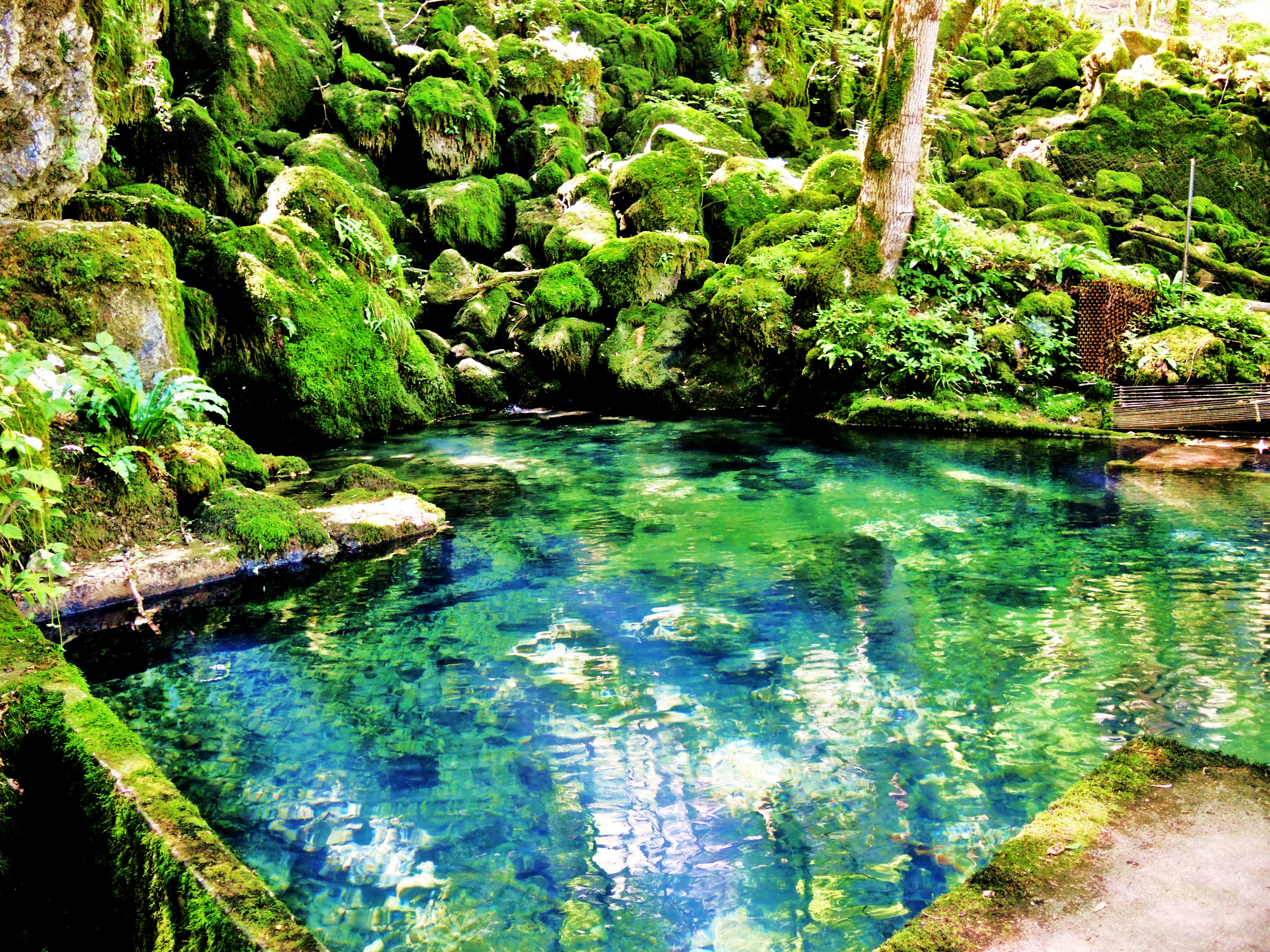 Bassin de la petite source de la Cuisance. Les Planches-près-Arbois. Jura.